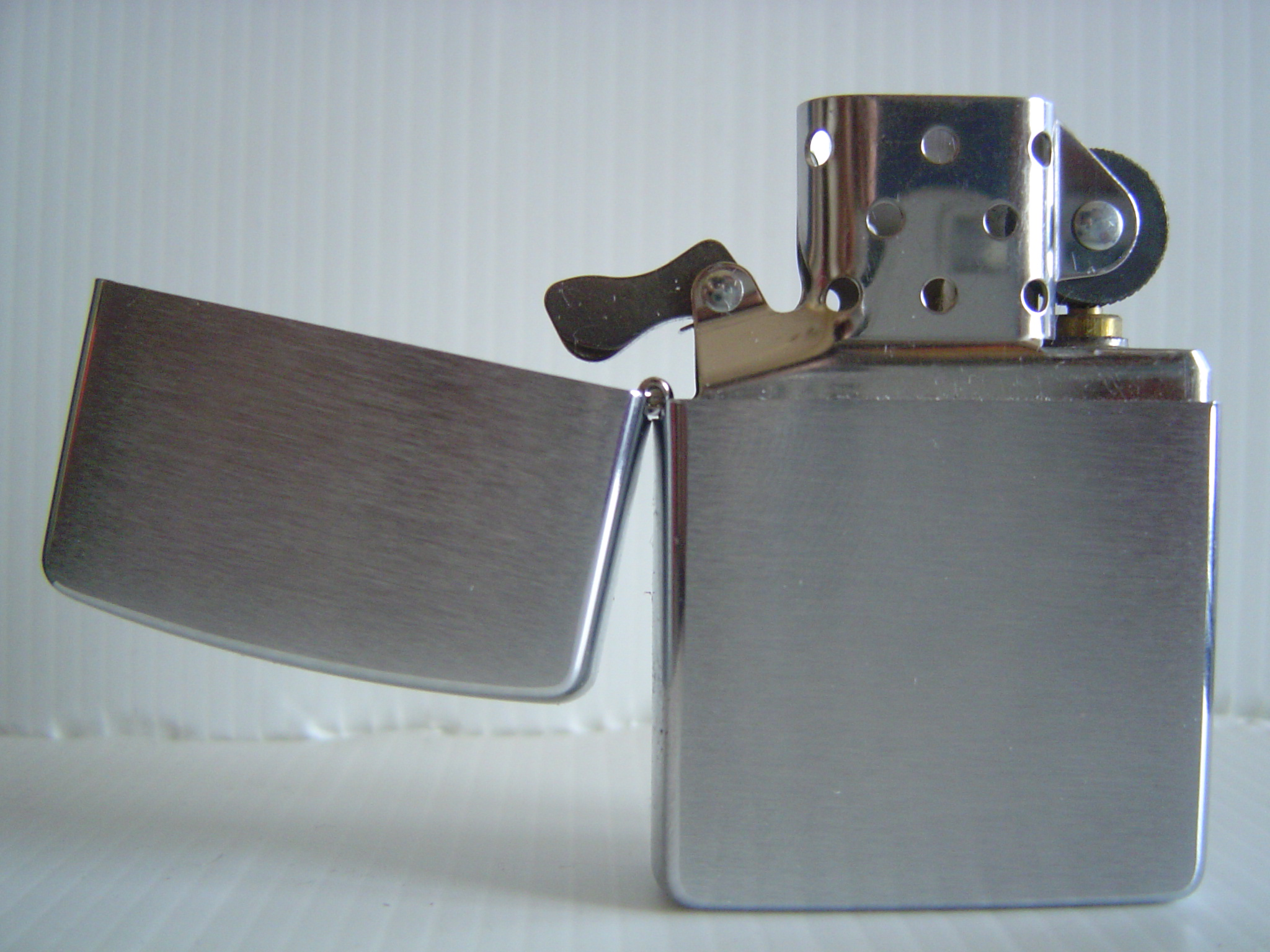 Zippo Satinato Aperto